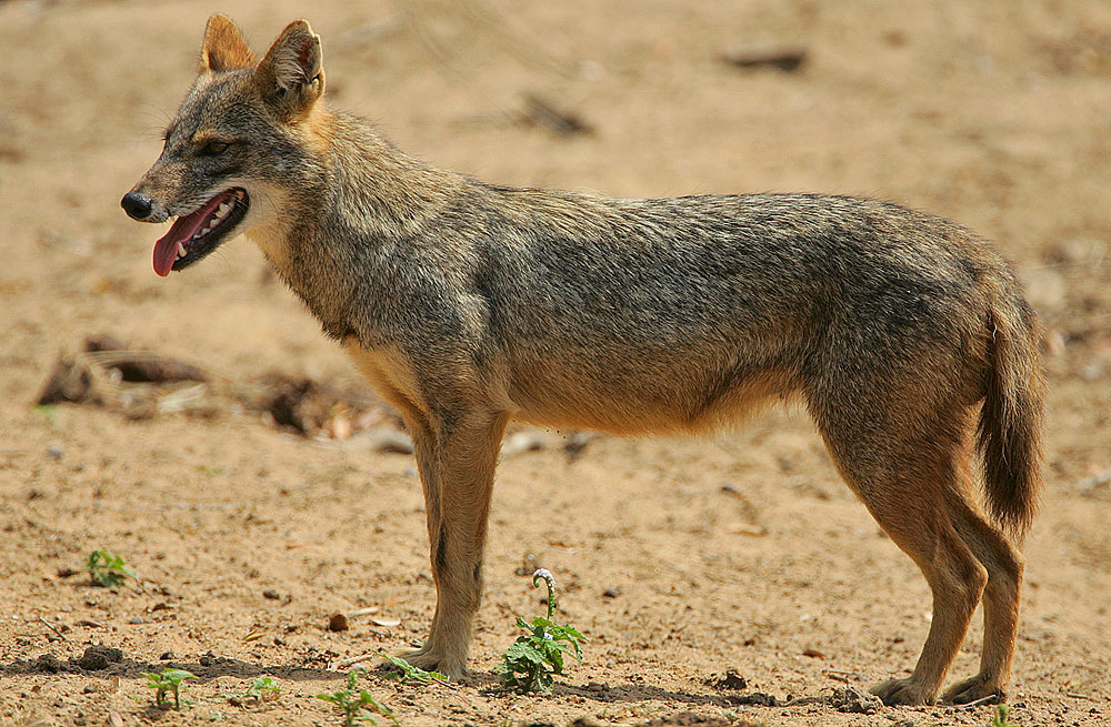 An adult male.